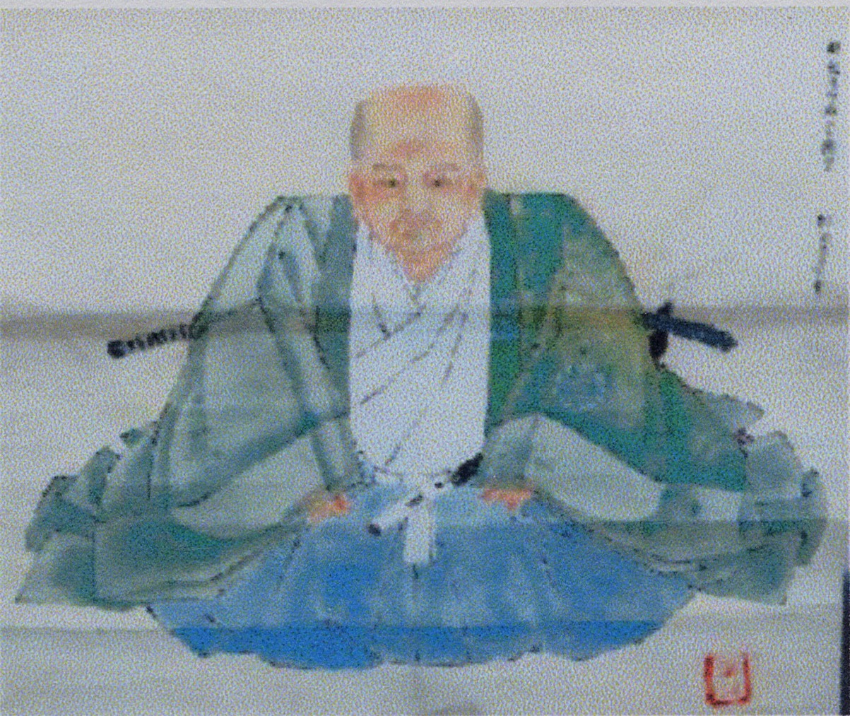 林忠英の肖像。